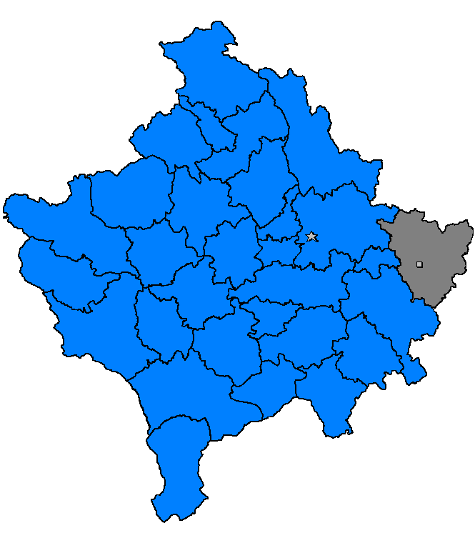 Kamenicë, Kosovë 2006